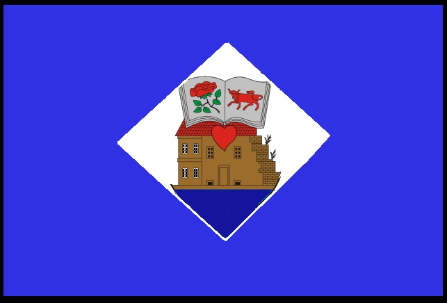 Беларуская (тарашкевіца): Сьцяг ВількаміруLietuvių: Ukmergės vėliava